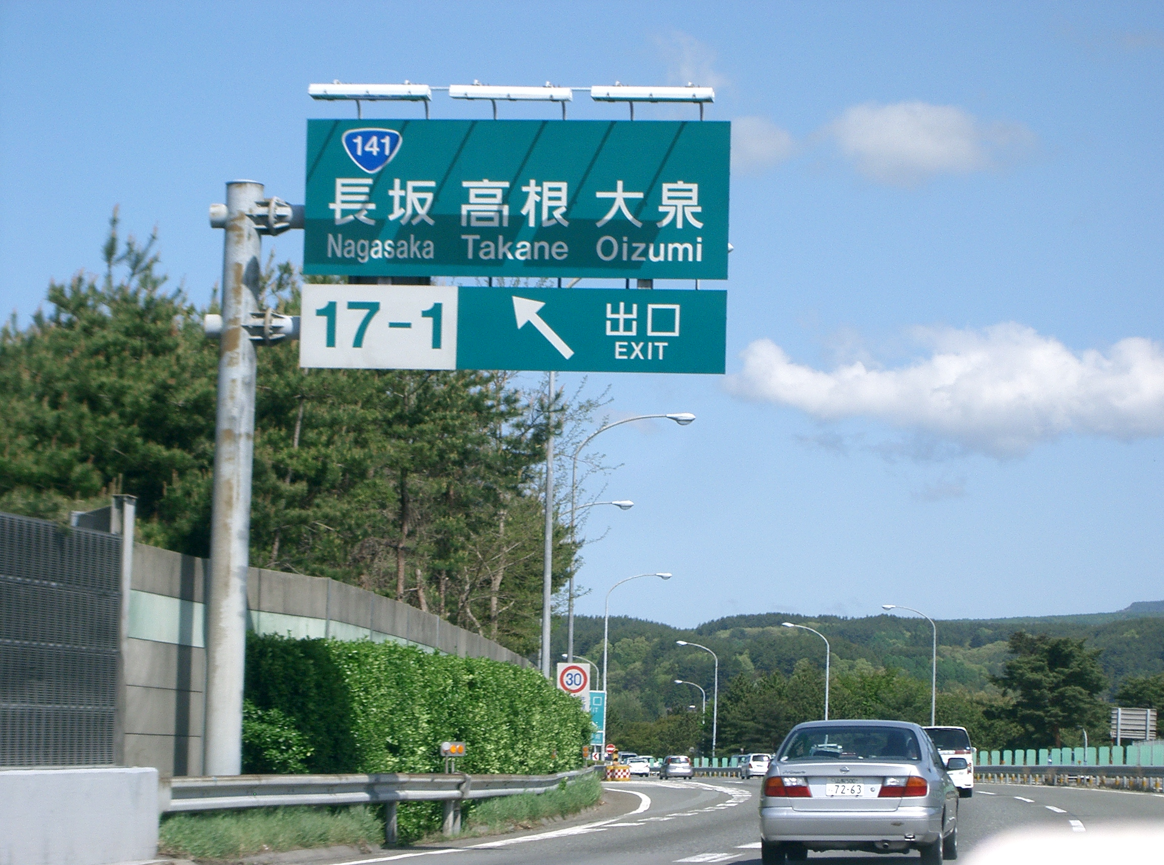 chuo-nagasakaIC-K(中央道下り長坂IC)